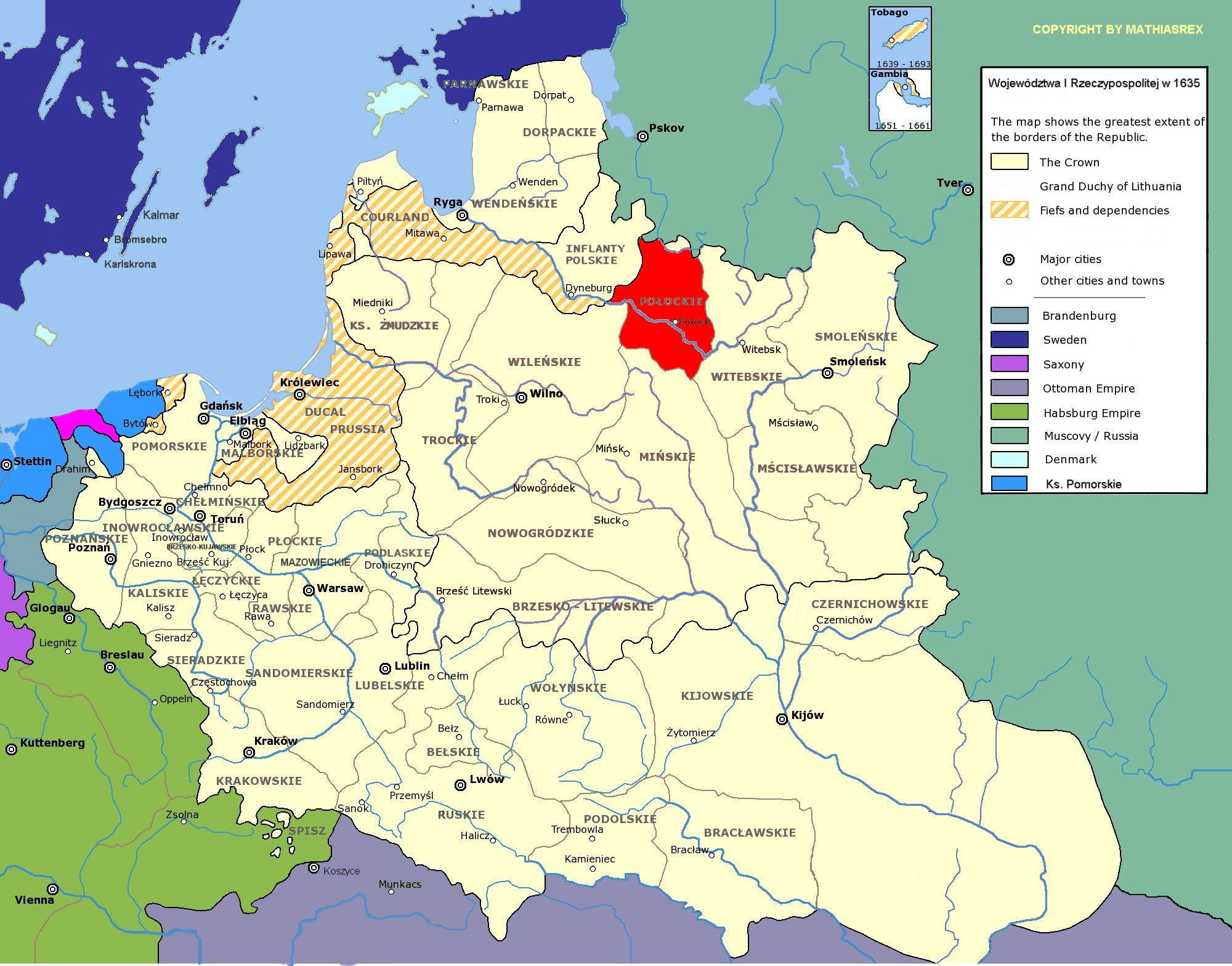 województwo połockie I Rzeczypospolitej A modified copy of Image:Rzeczpospolita voivodships.png by Halibutt